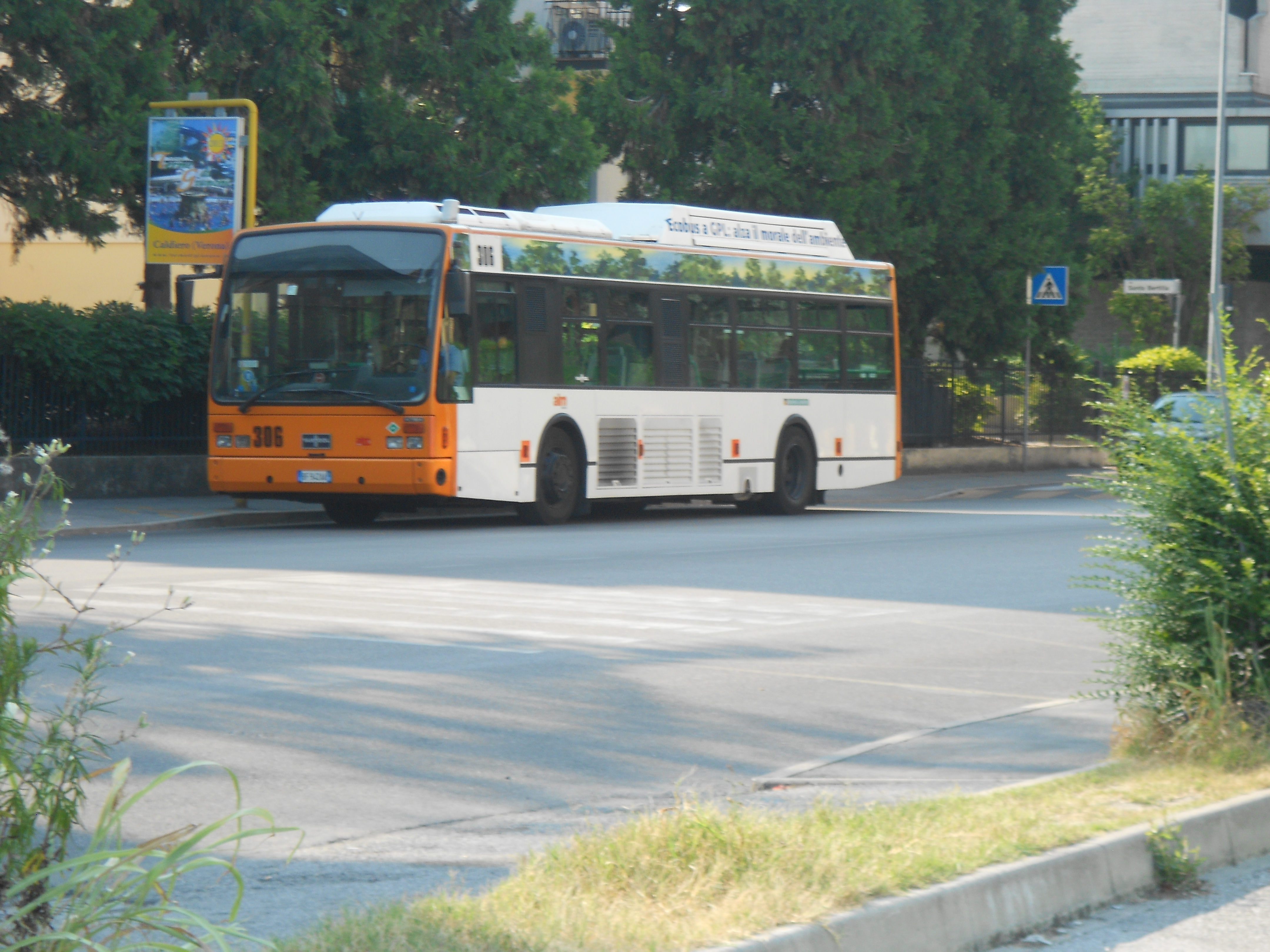 VanHool AN300 GPL di AIM Vicenza